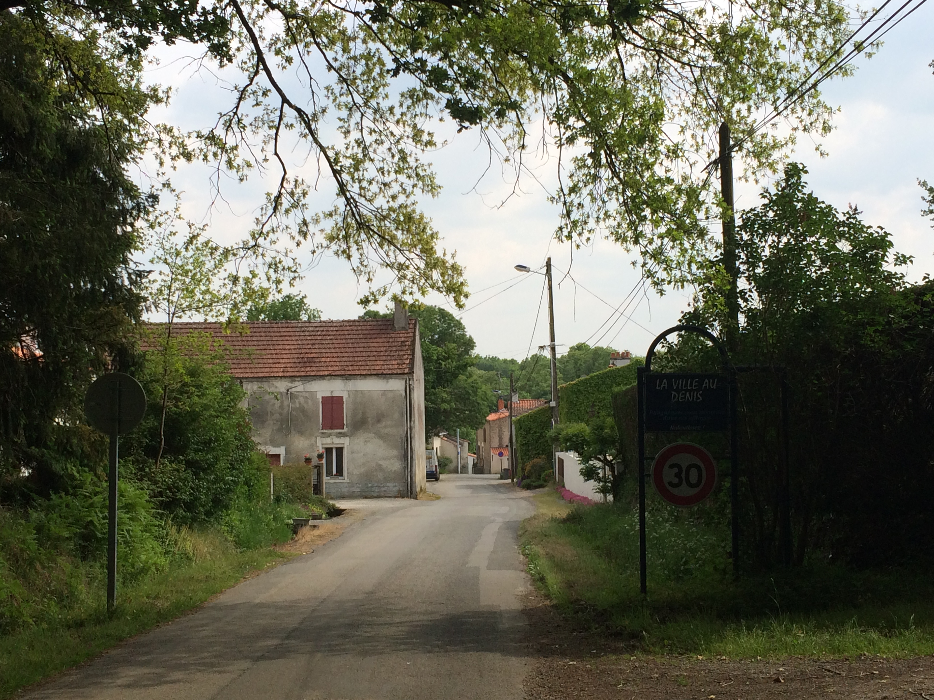 Entrée du village de la Ville au Denis